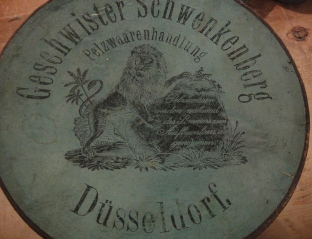 „Geschwister Schwenkenberg, Pelzwaarenhandlung, Düsseldorf.“ Grabenstr. 4 Deckel eines Muffkartons (Durchmesser 18,5 Zentimeter). „Pelzwaaren werden während es Sommers zum Aufbewahren angenommen.“ (Inhaber 1. Clara Schwenkenberg; 2. Emma Schwenkenberg) (Adressbuch der Oberbürgermeisterei Düsseldorf für 1889, Erster Theil., S. 259) Gegründet 4. Oktober 1806 durch Kürschnermeister Friedrich Schwenkenberg. Später übernommen durch Kürschnermeister Hubert Wolff aus Hagen (1956 waren Hubert Wolff, Frau und Tochter im Betrieb tätig), zuletzt unter dem Namen „Wolff Pelze“ von Kürschnermeister Werner Wolff, Betriebsschließung Anfang 2005).